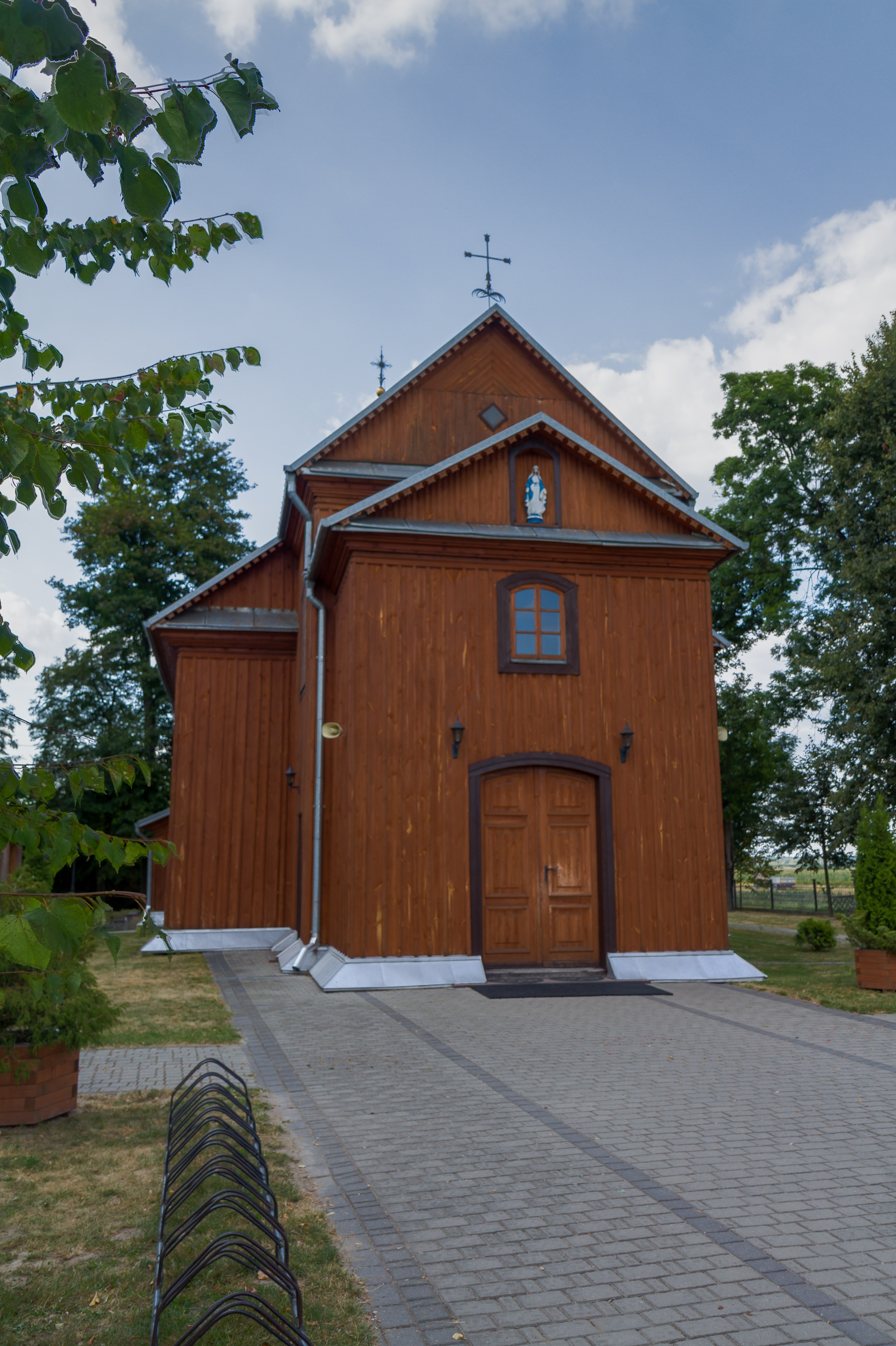 Przegaliny Duże, kościół par. p.w. Opieki Matki Boskiej, 1 poł. XIX